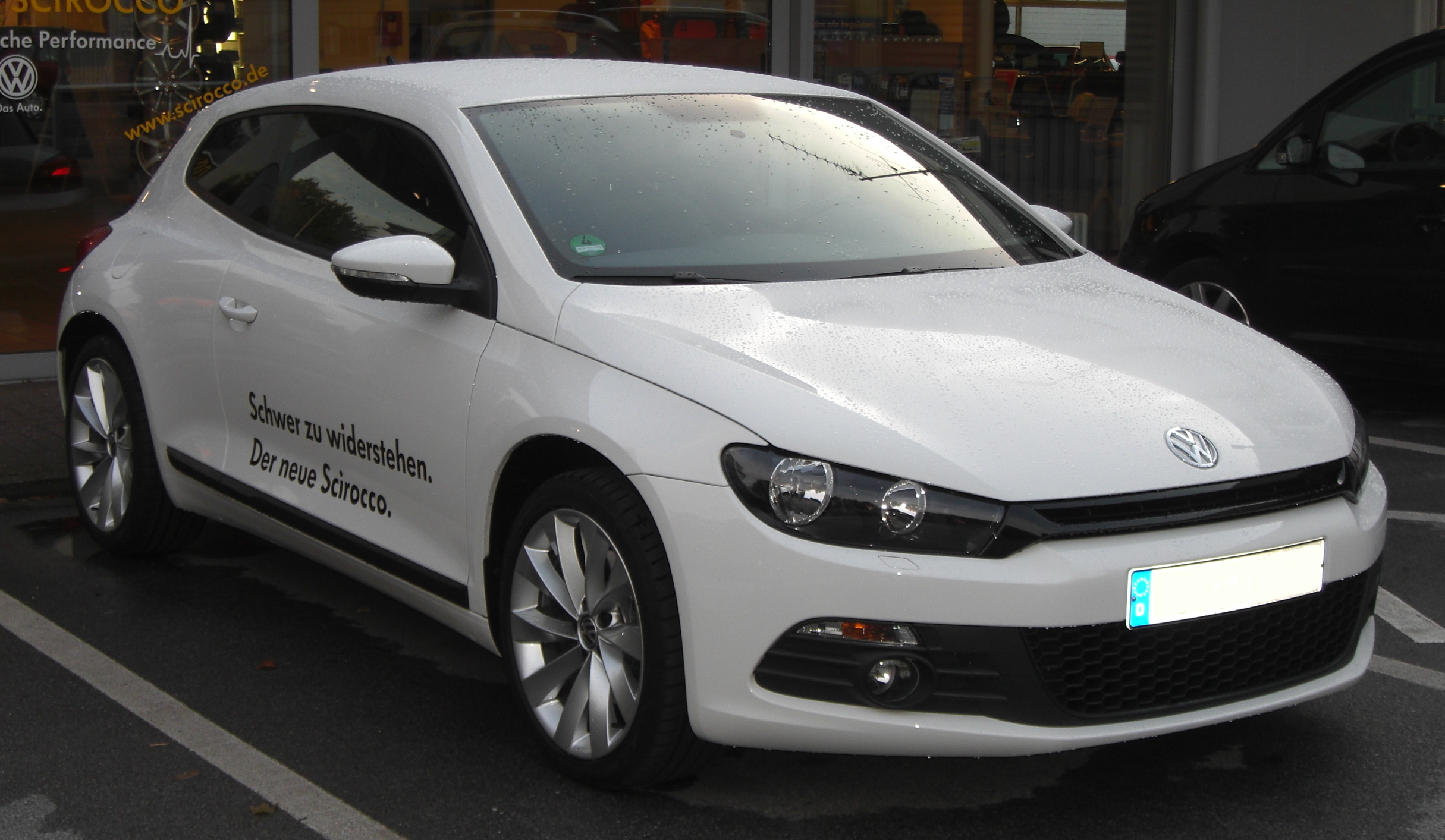 VW Scirocco (2008)